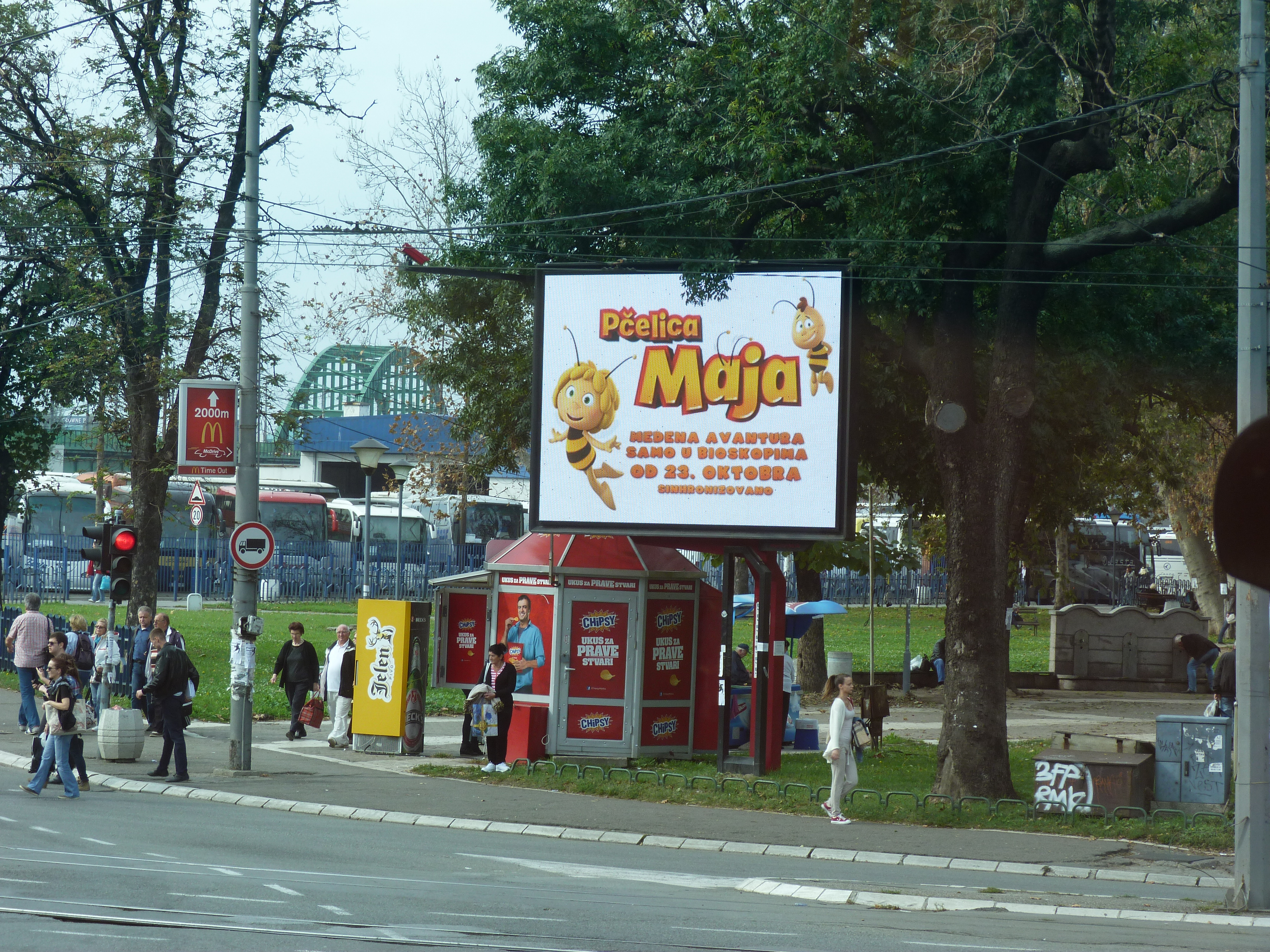 A felvétel 2014. október 21-én készült Nándorfehérváron. ©© Derzsi Elekes Andor, Budapest, 2014, A kép egészben, vagy részletekben másolását, bármilyen úton történő sokszorosítását és felhasználását a szerző ellenérték nélkül, jogutódjaira is kihatóan megengedi. Az engedély kiterjed a kereskedelmi célú hasznosításra is. Kéri azonban nevének feltüntetését a felhasználás során. A Metapolisz sorozat valamennyi képe és filmje Creative Commons alatti valamint kereskedelmi - for profit - célra is felhasználható. Ajánlott hivatkozás: Derzsi Elekes Andor: Metapolisz DVD line